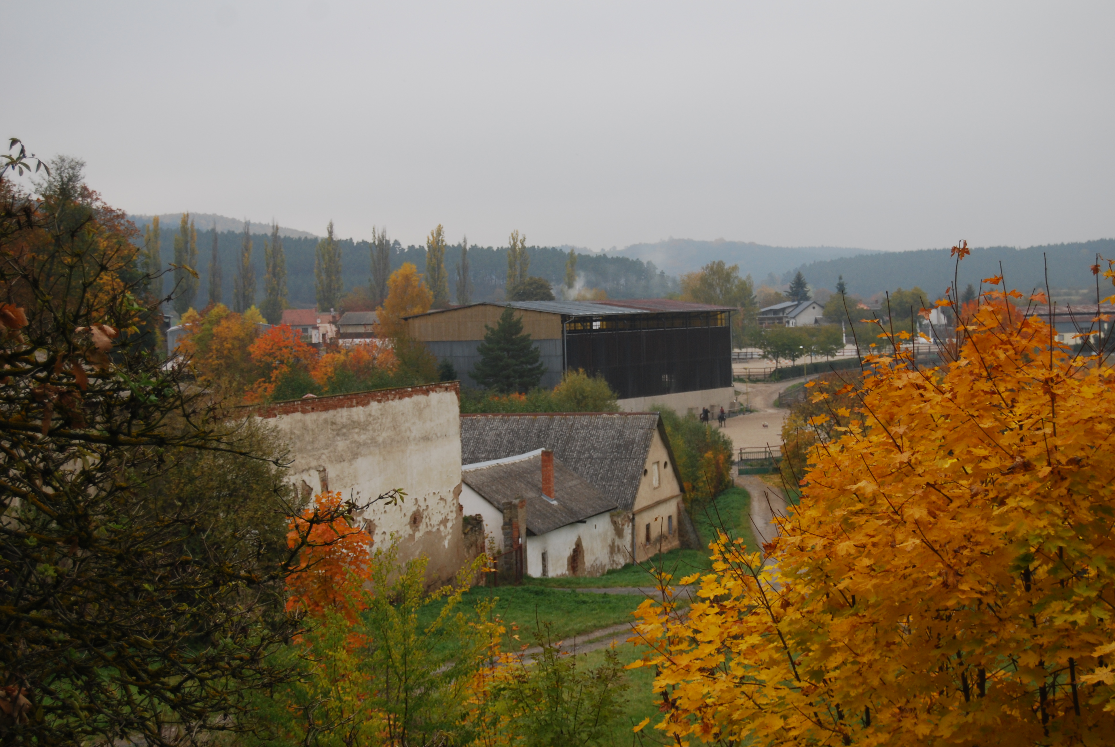 Pohled na část obce a jezdecký areál. Obec Zduchovice v okrese Příbram, kraj Středočeský. Česká republika.